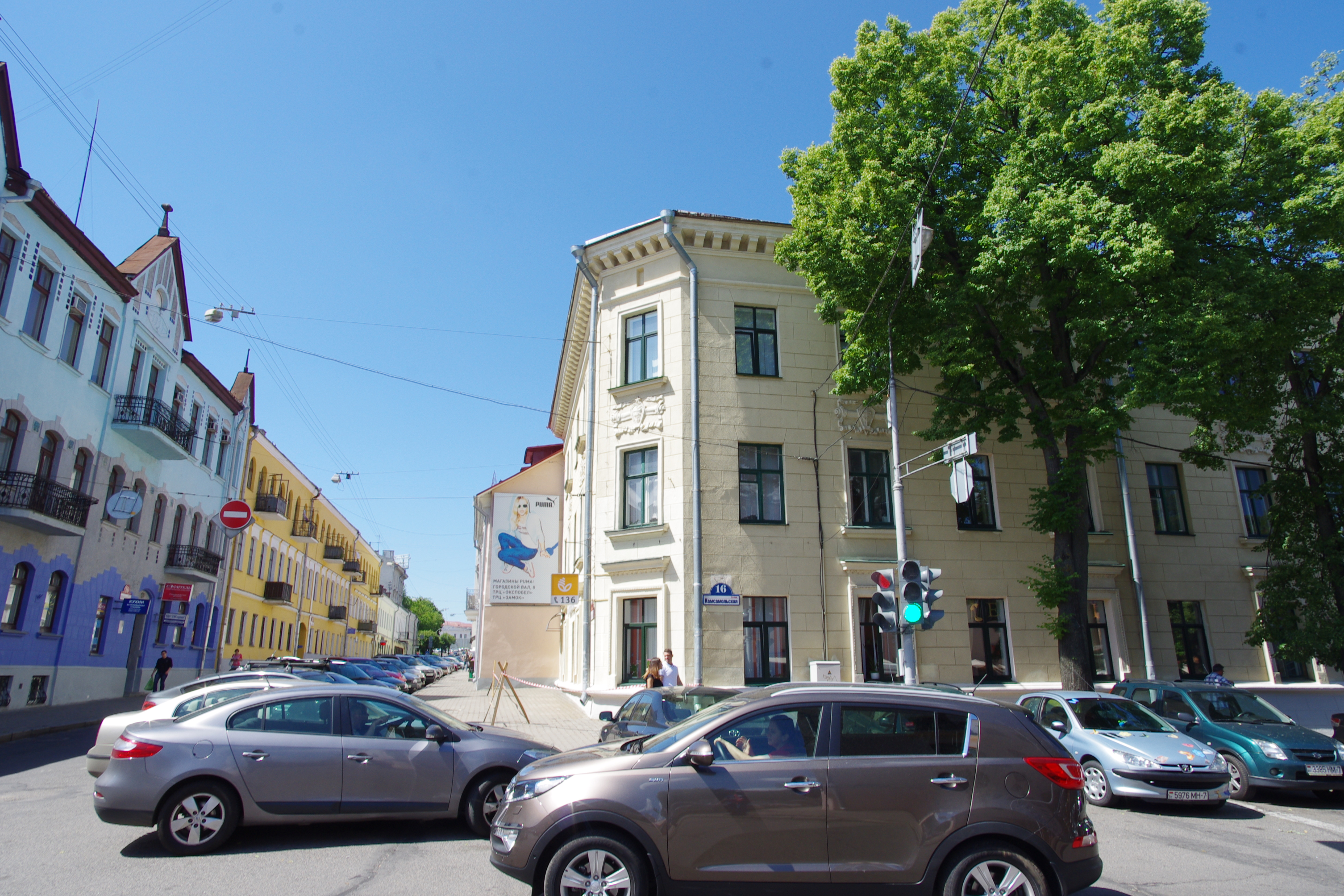 Minsk, Belarus